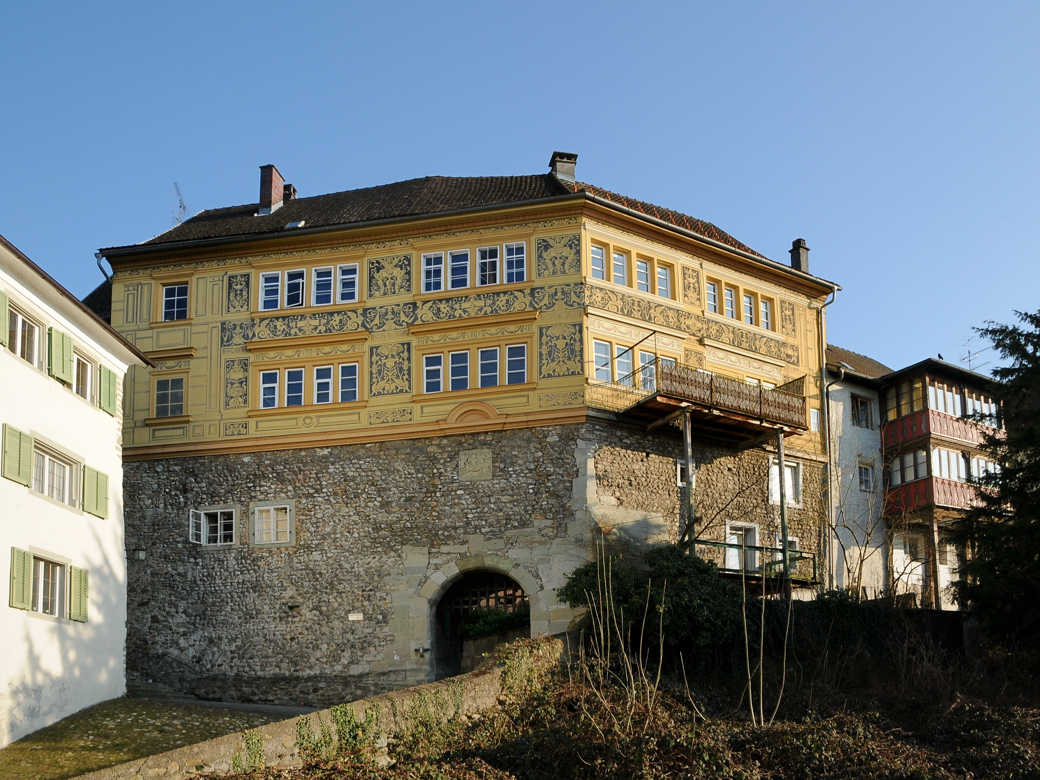 Ehregutaplatz Nr.1 in der Oberstadt von Bregenz, Vorarlberg